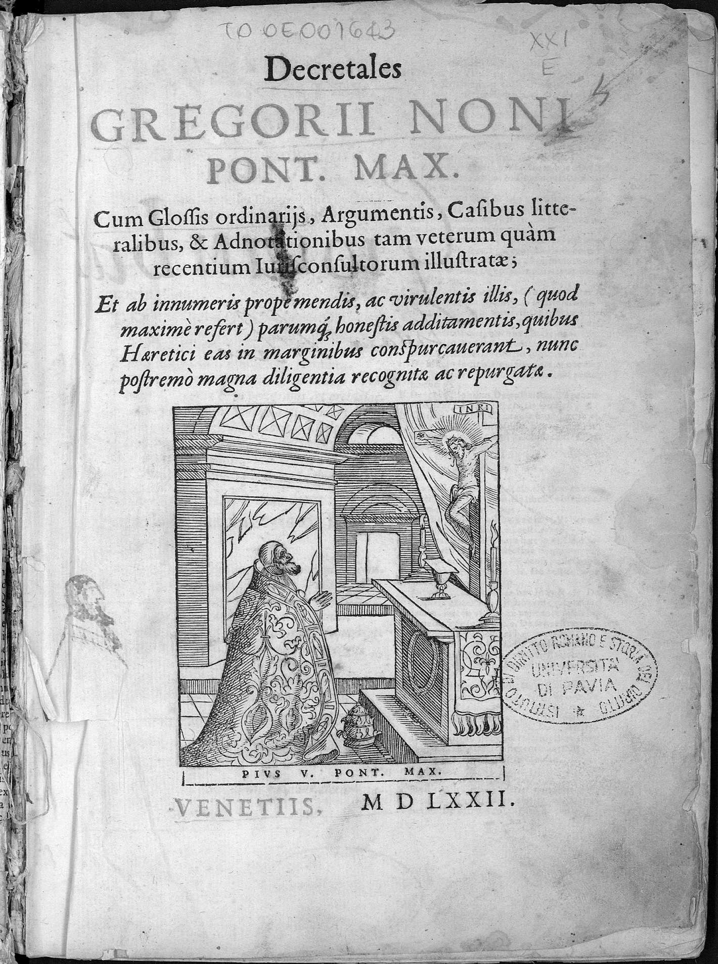 Frontespizio